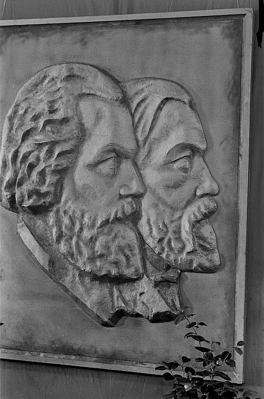 Original image description from the Deutsche FotothekReliefbildniss von Karl Marx und Friedrich Engels